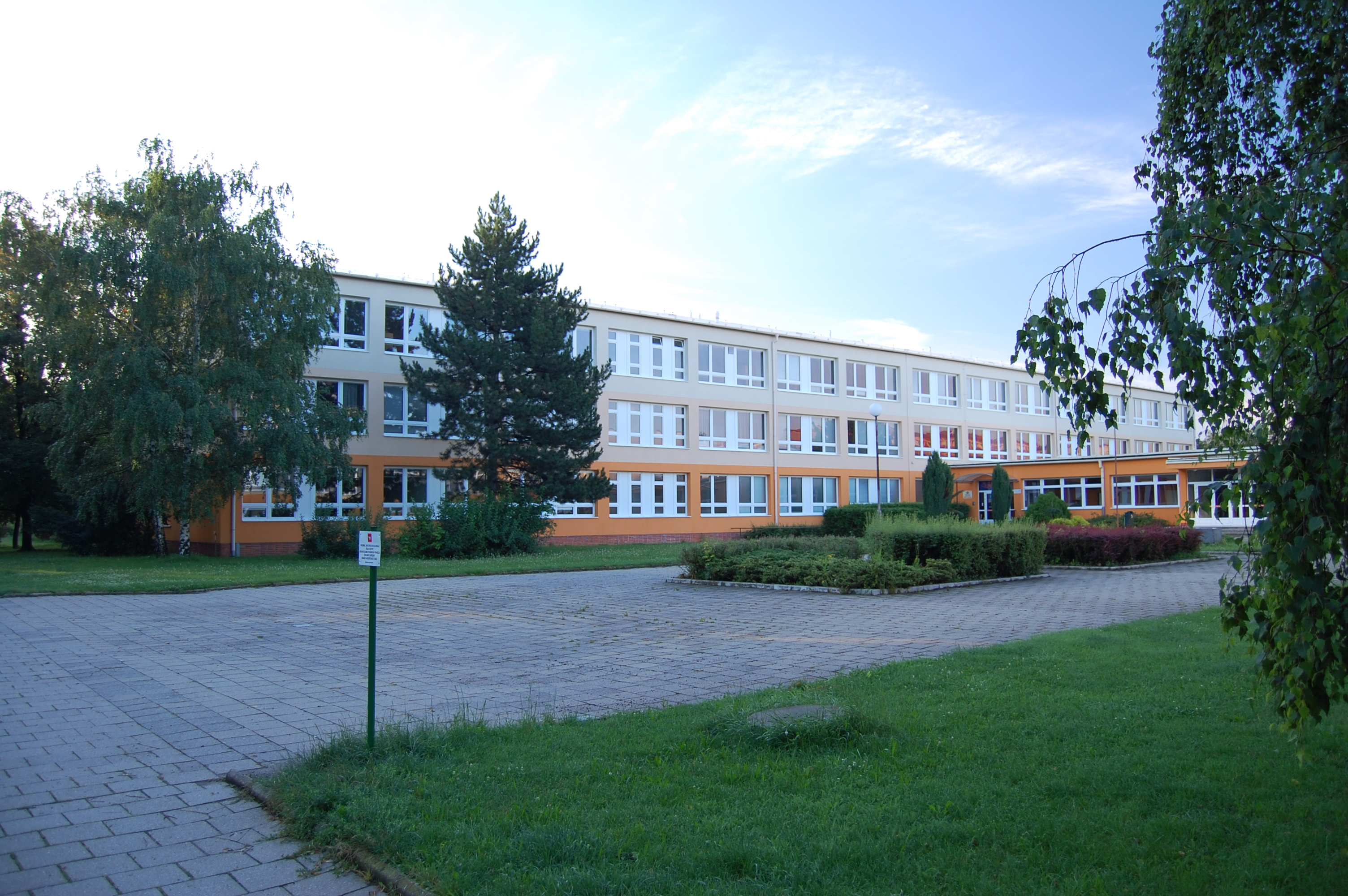 Reálné Gymnázium Prostějov